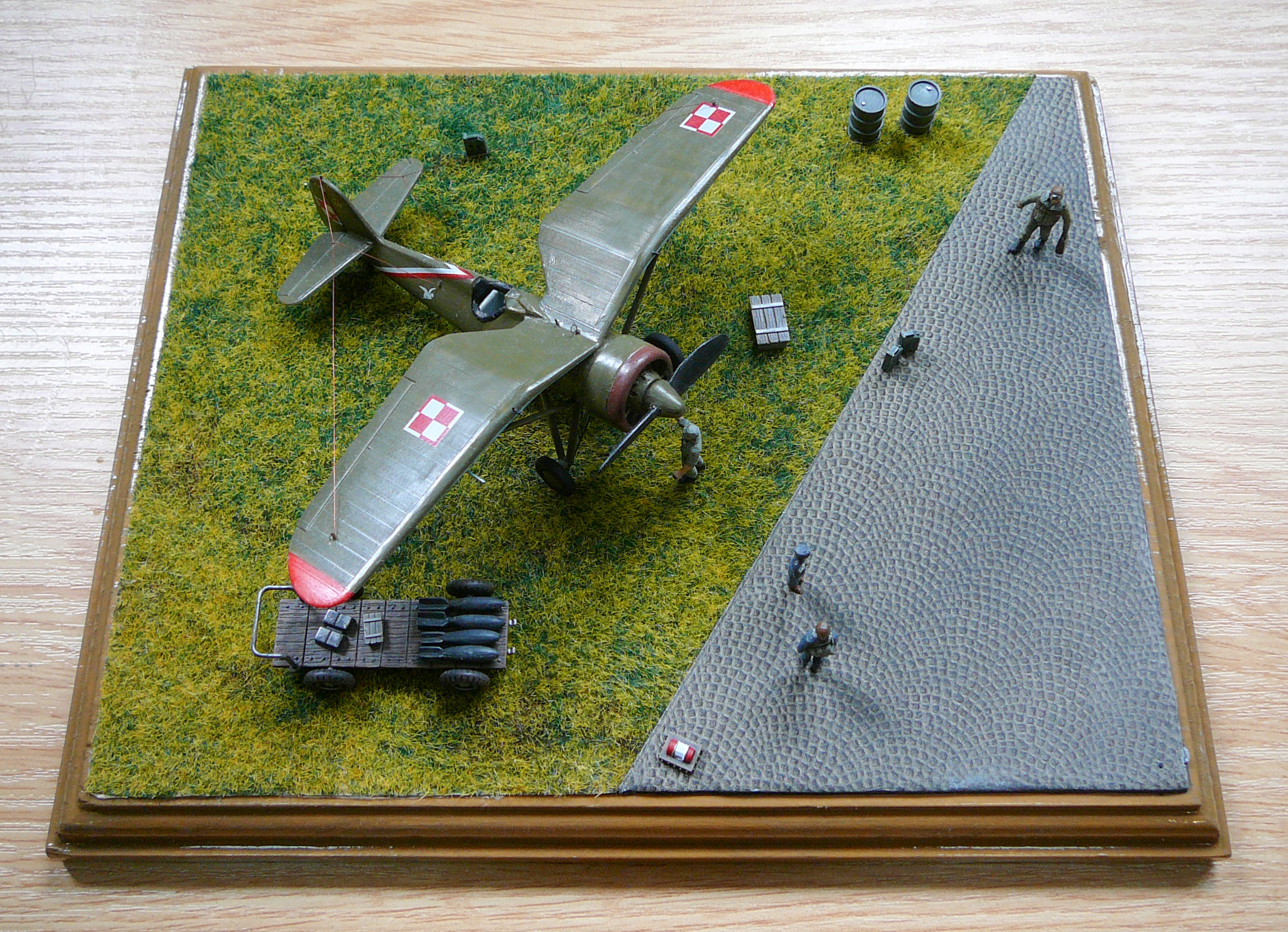 Diorama PZL P-11c podczas „Wystawy-konkursu kartonowych i plastikowych redukcyjnych modeli samolotów, szybowców, rakiet, śmigłowców i dioram lotniczych” w Mielcu w 2014 roku.